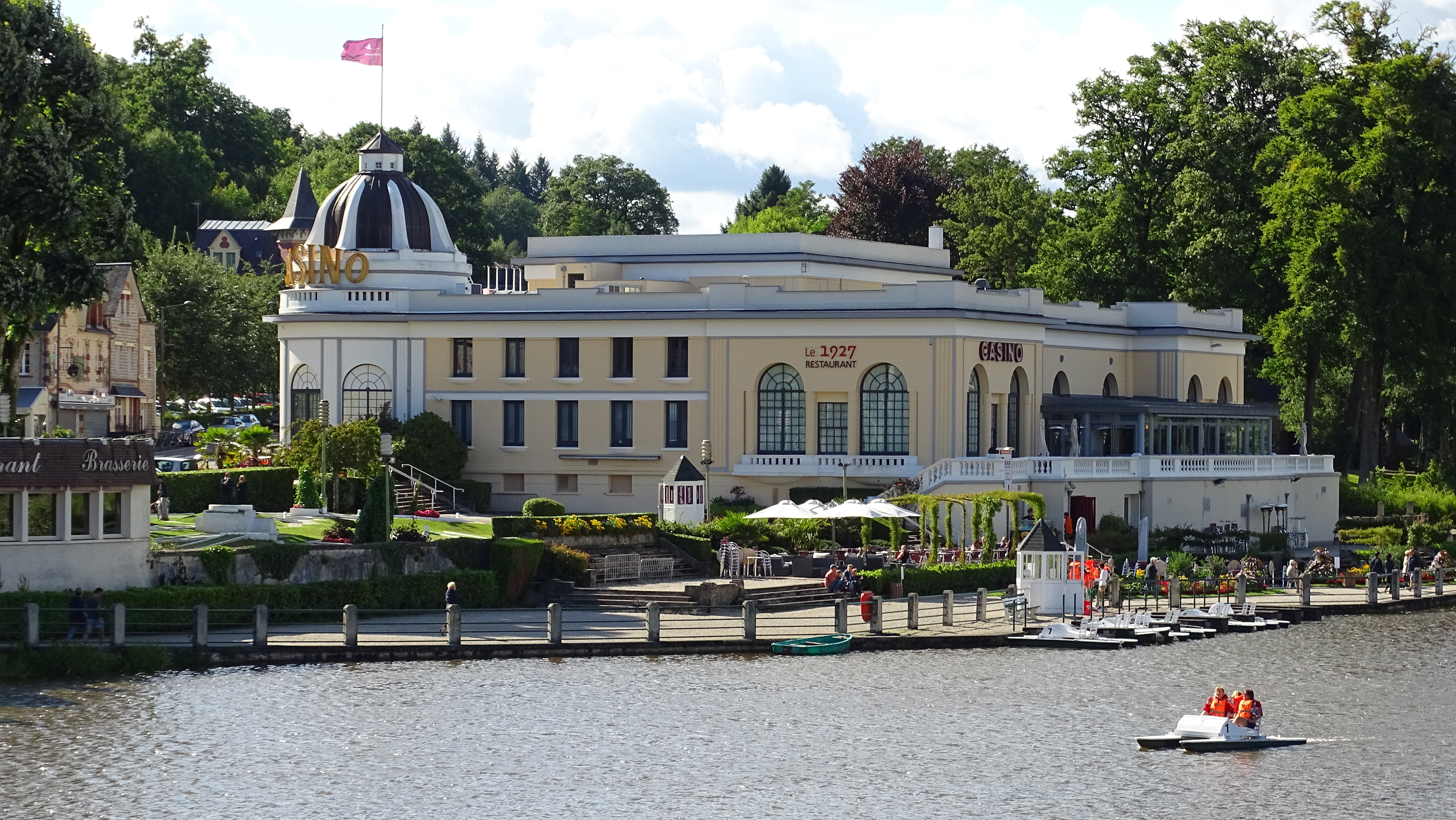 Bagnoles-de-l'Orne est une ancienne commune française, située dans le département de l'Orne en région Normandie, devenue le 1er janvier 2016 une commune déléguée au sein de la commune nouvelle de Bagnoles-de-l'Orne-Normandie. Elle est peuplée de 2 359 habitants. Elle est célèbre en tant qu'unique station thermale de l'Ouest de la France et haut-lieu touristique de la Normandie, reconnue attrayante et offrant un large éventail de services touristiques.